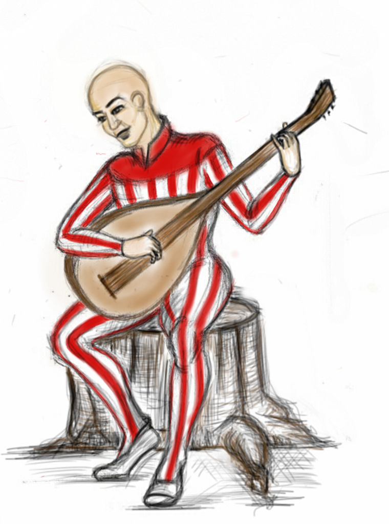 Die Figur wurde für Komik-Geschichten von Roxana Khazdouzian erfunden und gezeichnet. Sie wird zusätzlich auf CD-Covern und Büchern abgebildet.